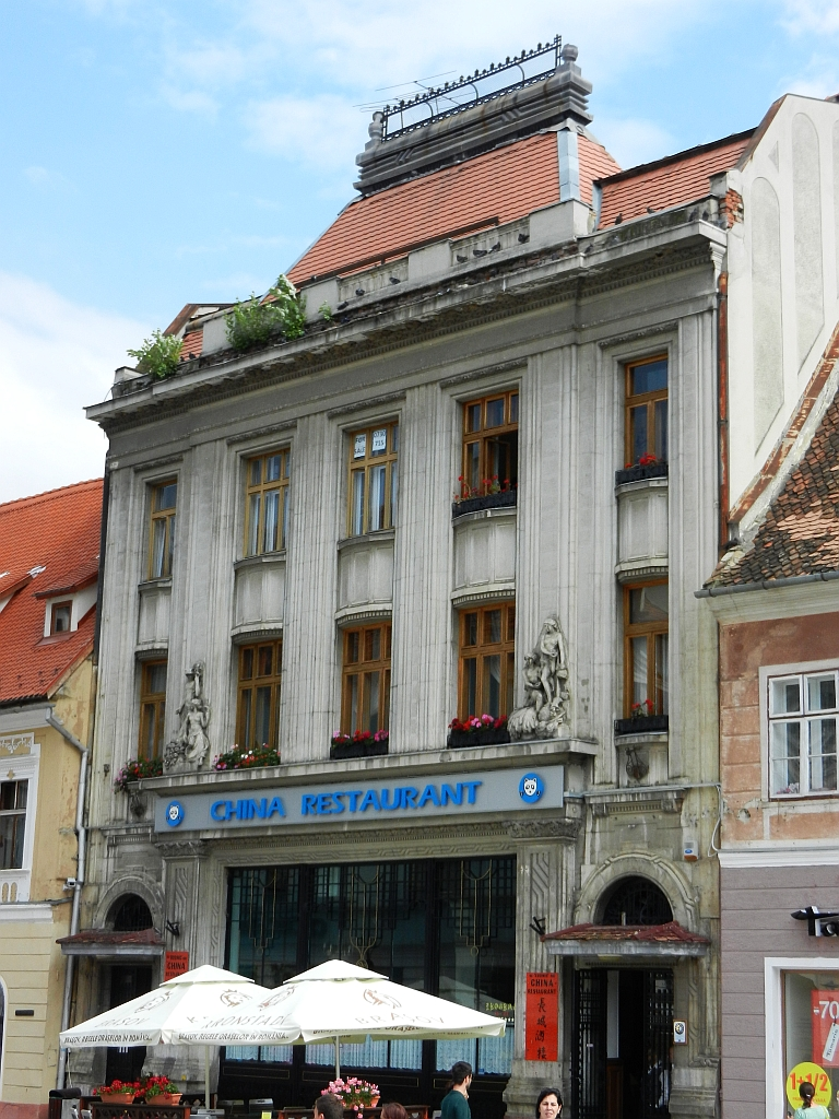 Casa din curte